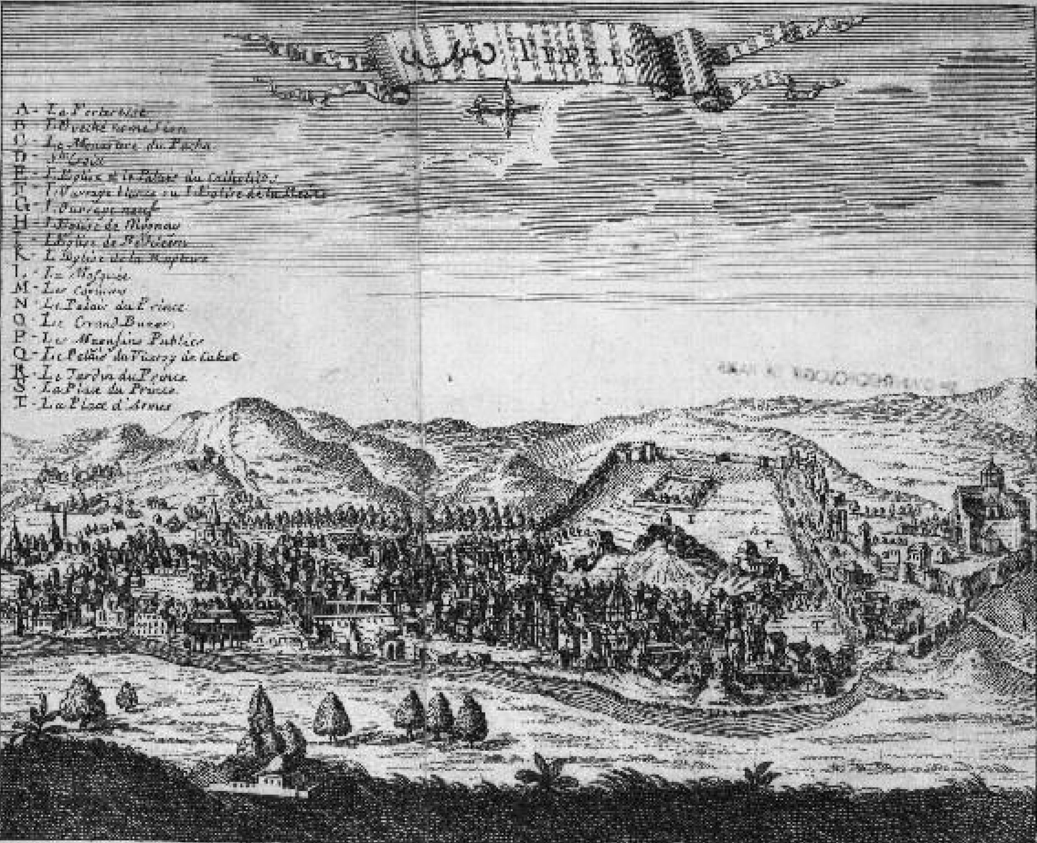 [Tome 2. Pl. dépl. en reg. p.155 : Perse. Vue de la ville fortifiée de Teflis ou Tifflis.] Teflis. [cote : Réserve DS 257 C 47 1723 v1 à 10]